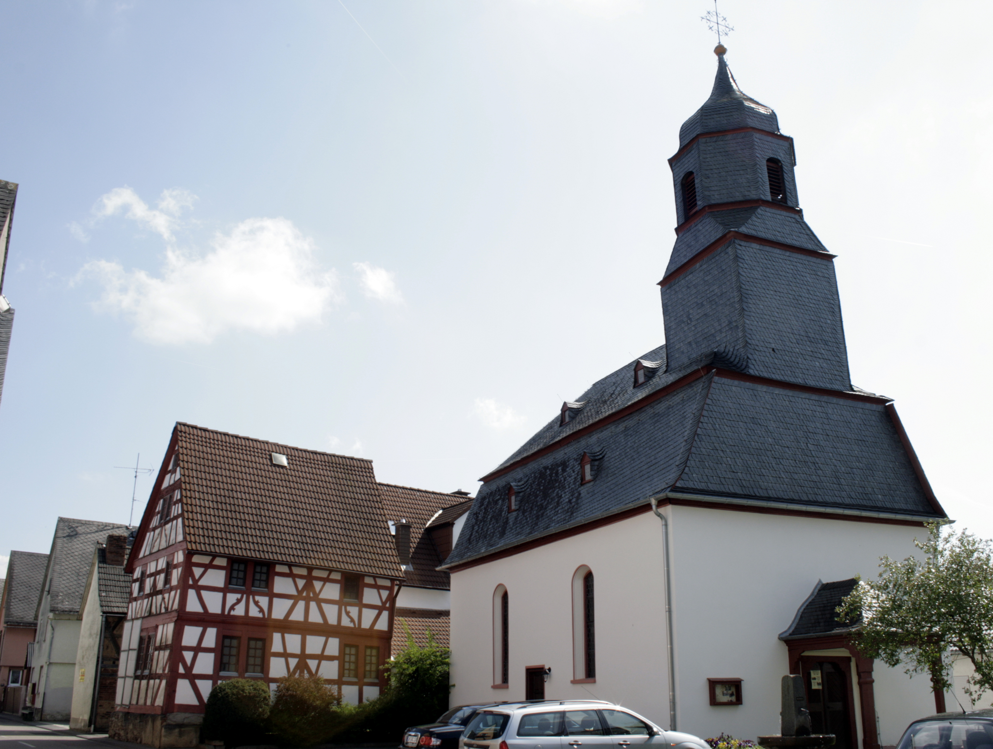 Kirche in Neesbach, Deutschland